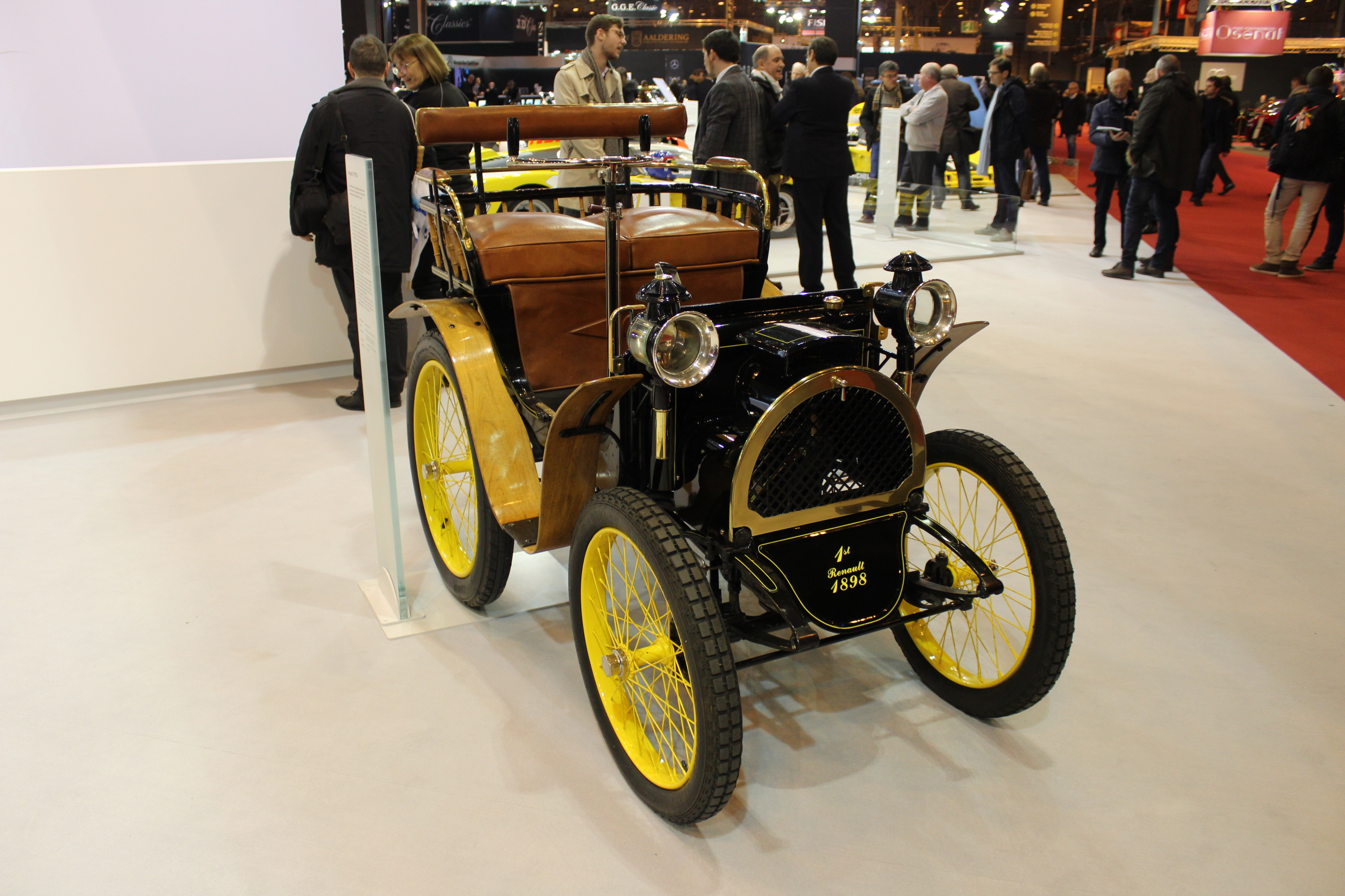 Rétromobile 2018